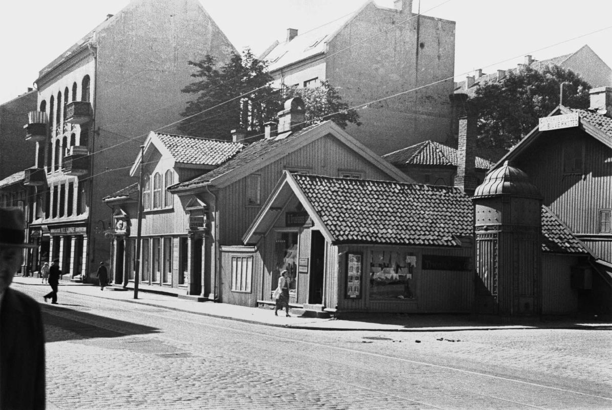 Rester av trebebyggelsen i Balkeby ved Bogstadveien (krysset ved Industrigata). Vi ser bl.a. nr. 30 (inkl. sidebygning ved Industrigata), 28 (murbygning), 26 (lav trebygning, skimtes så vidt ) og 24 (murbygning, bare litt av gavlen). Mellom nr. 28 og 30 gikk Abildgaards gade (tidl. Abels gade), som ble faset ut i 1930-årene. Ukjent fotograf, juni 1938. Fra Byhistorisk samling hos Oslo Museum.